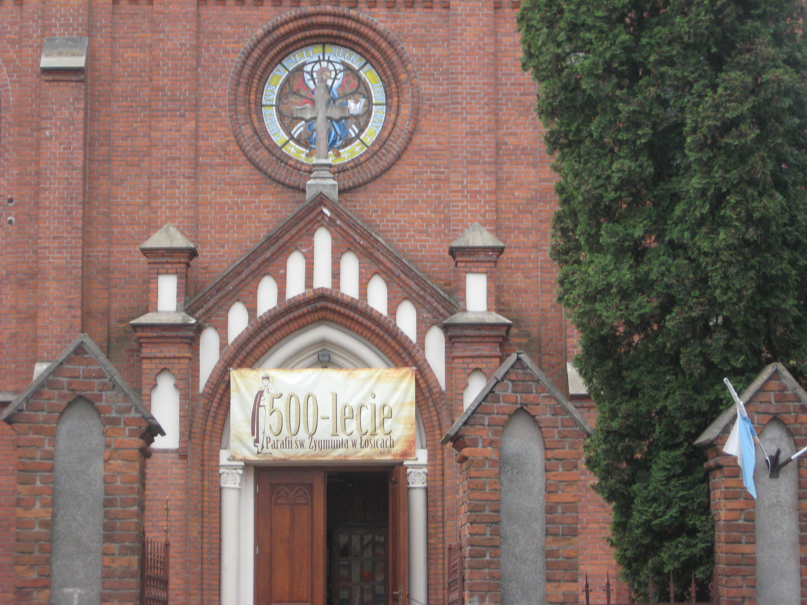 500 lecie parafii św Zygmunta w Łosicach - wejście do kościoła